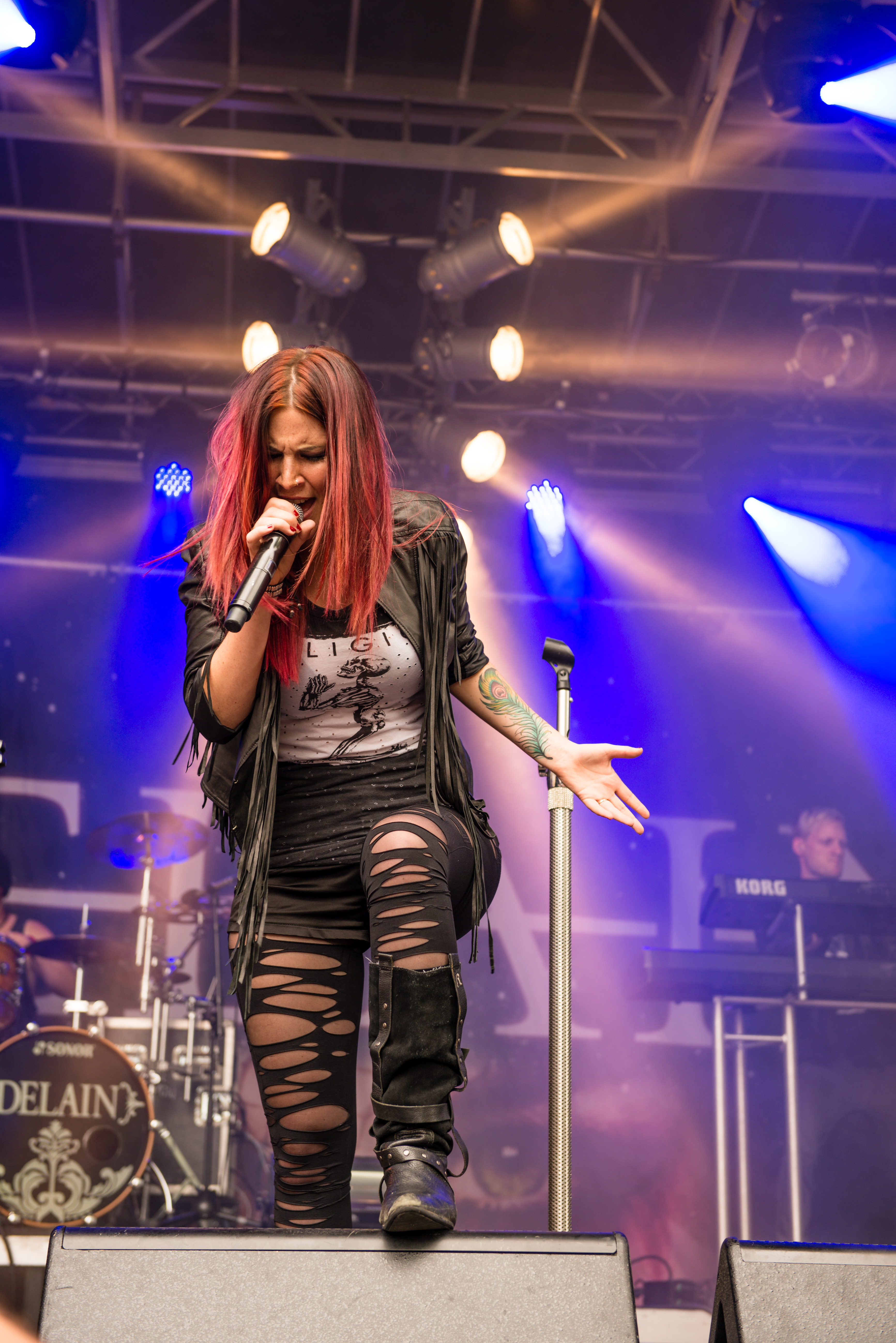 'Castle Rock 2014 - Mülheim an der Ruhr': 'Delain'